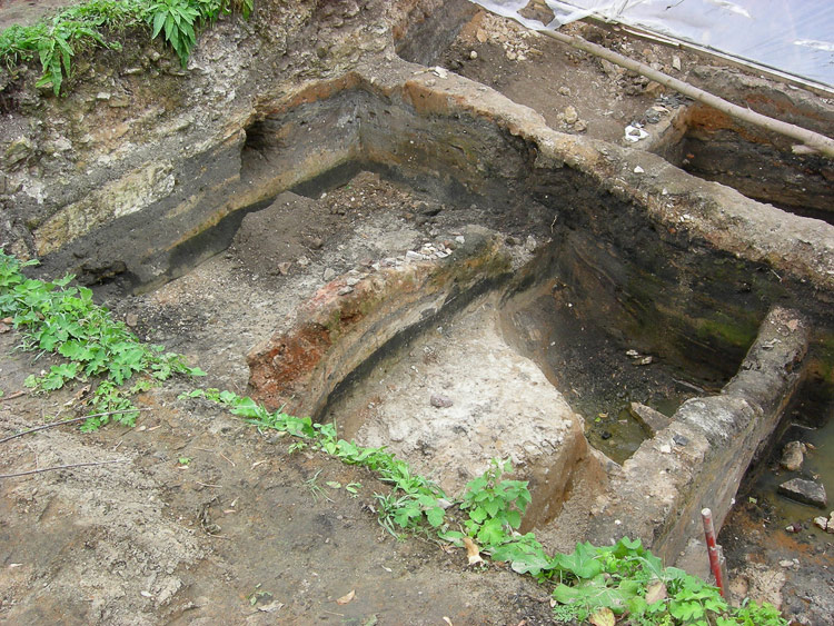 Раскоп на территории Серпуховского кремля в 2006 году Видно основание средневекового жилища Категория:Серпухов